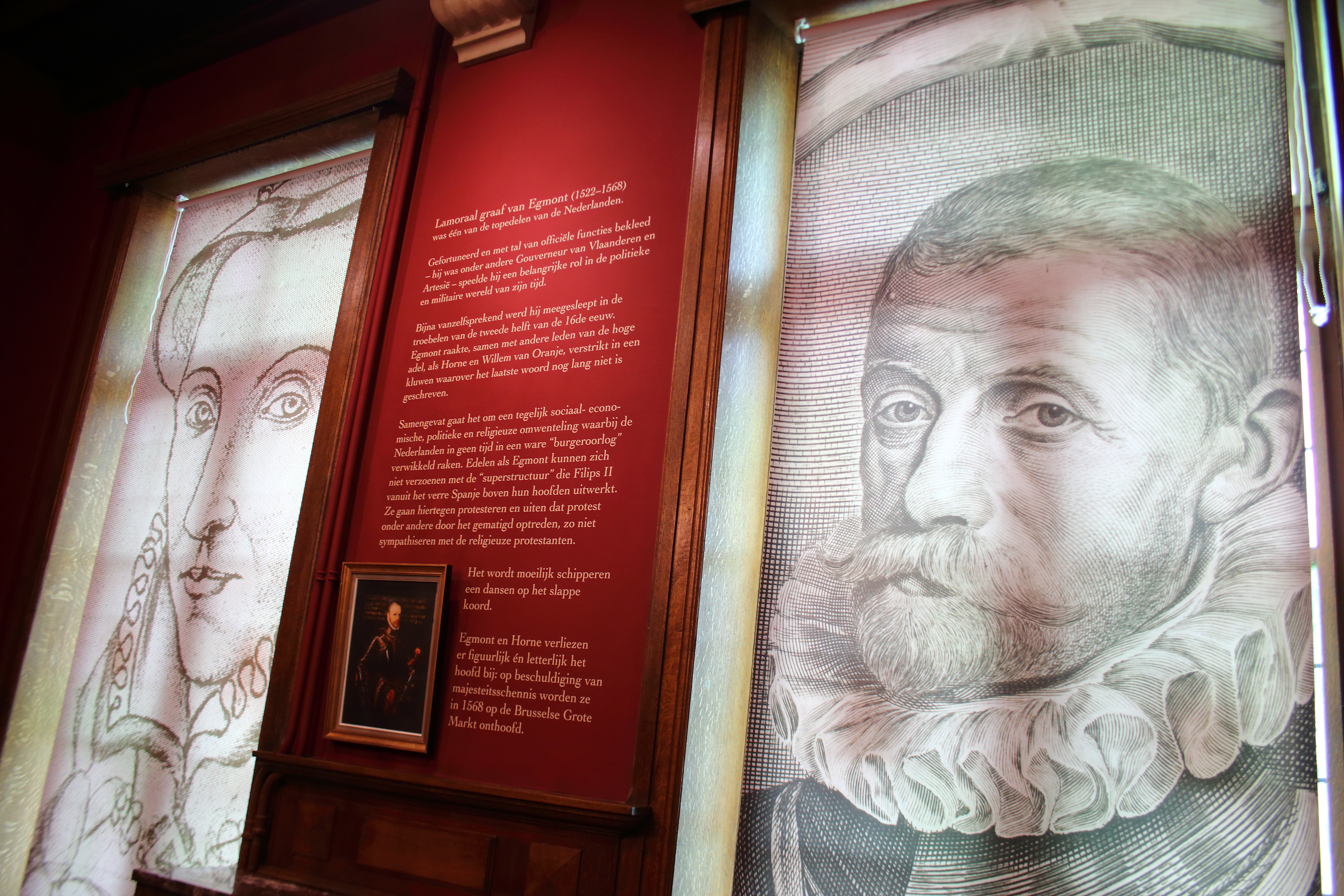 Egmontkamer, stadhuis Zottegem, Vlaanderen, België